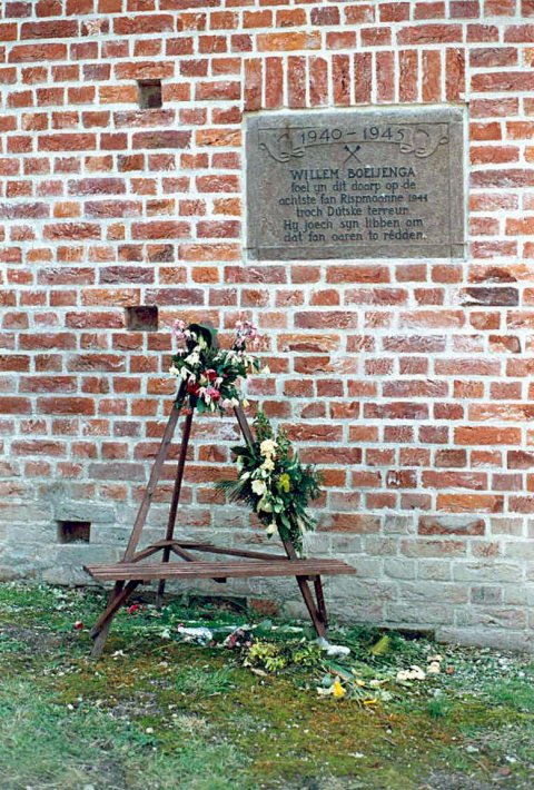 Oorlogsmonument door Arjen Goodijk